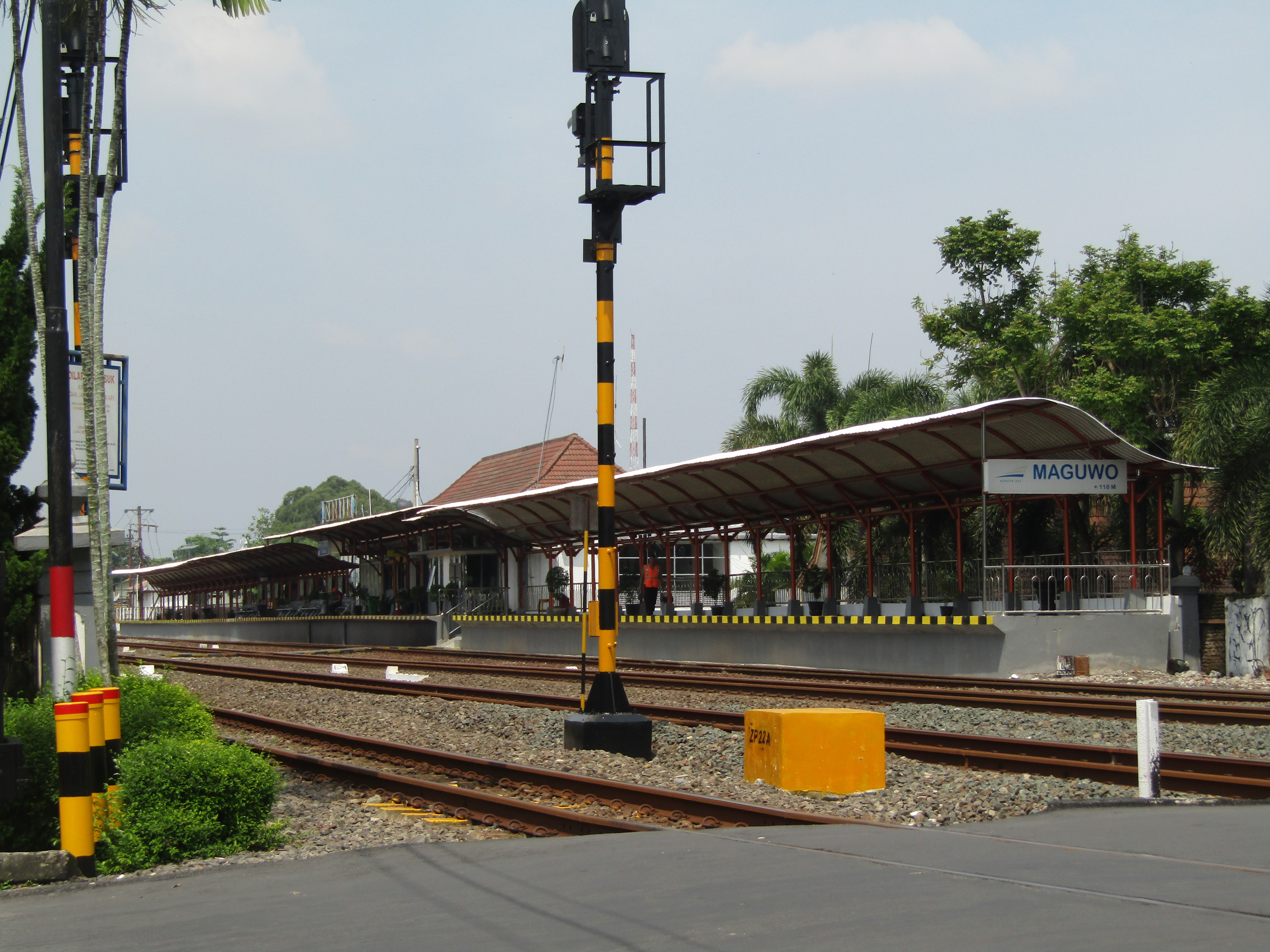 Tampak perspektif Stasiun Maguwo, 2019